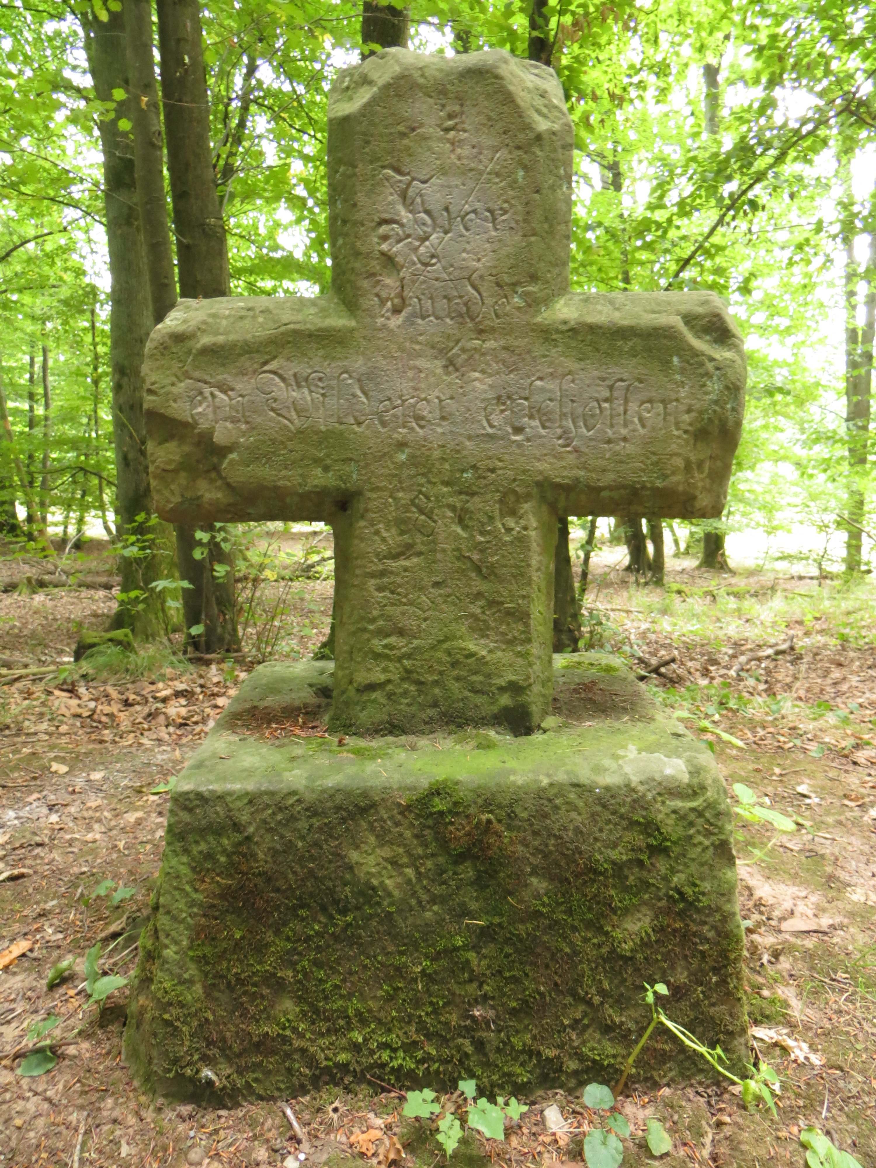 Das Wilderers Kreuz in Heilbronn, Vorderseite zum Weg